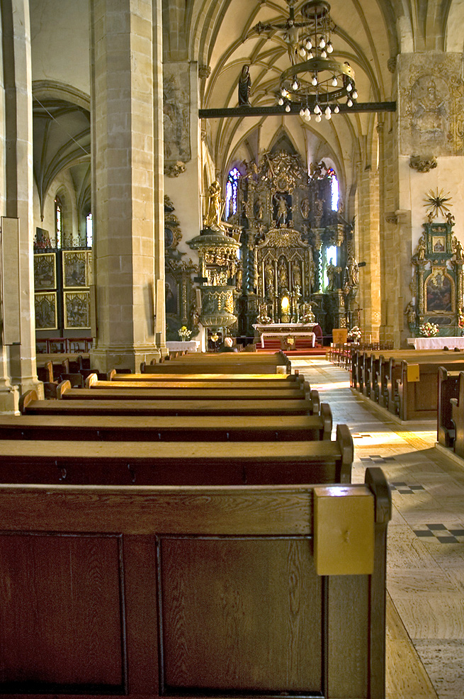 Interiér a hlavný oltár Konkatedrály sv. Mikuláša, Prešov